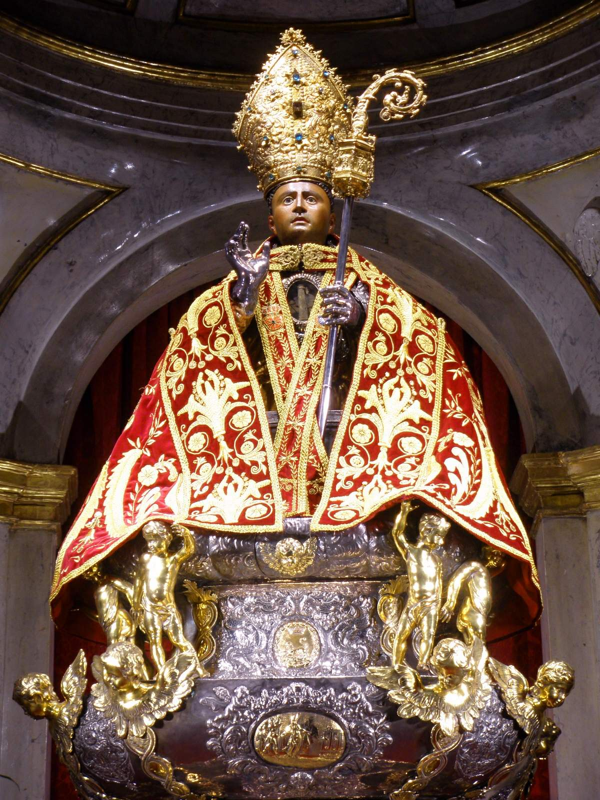 Capilla de San Fermín, Iglesia de San Lorenzo (Pamplona)